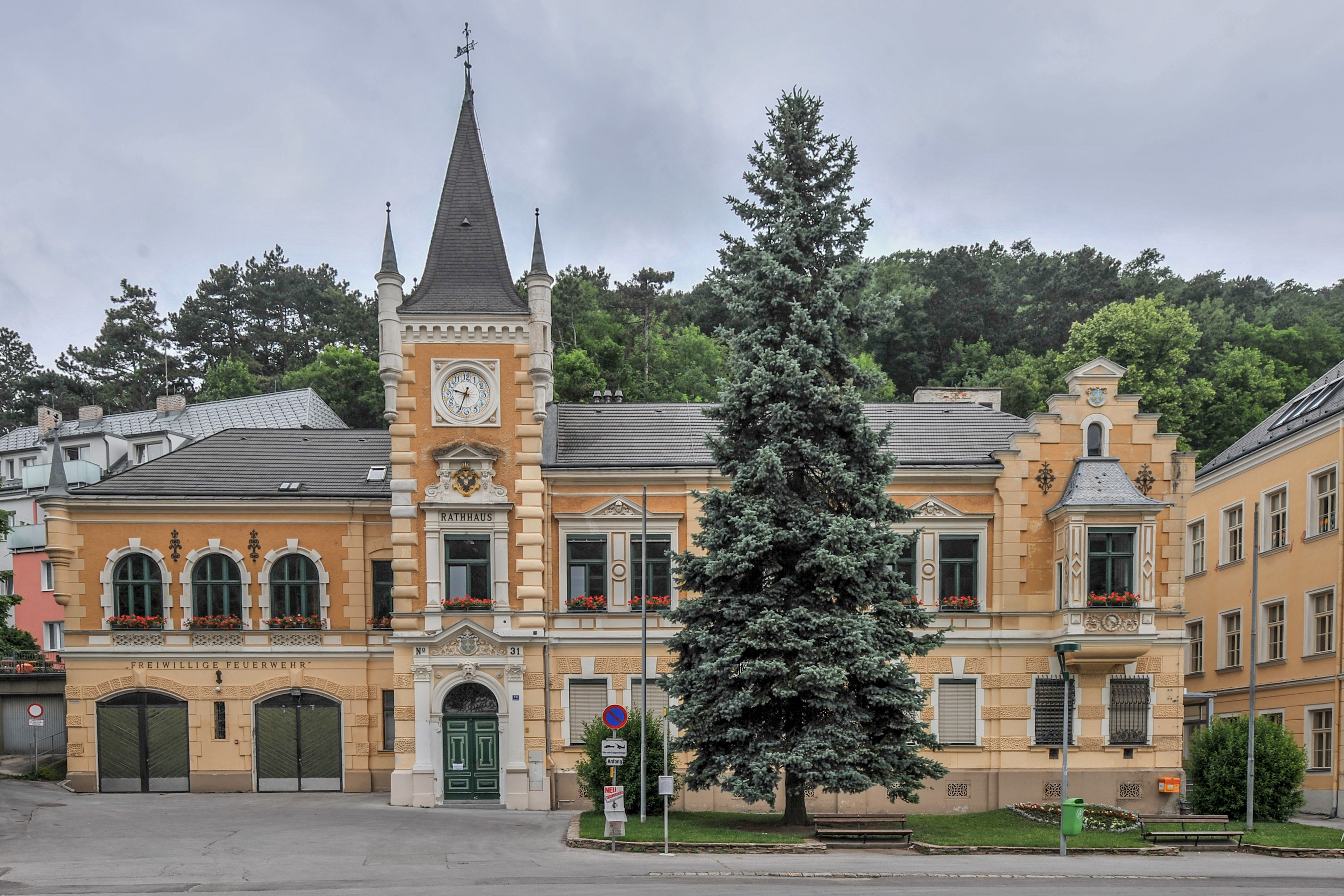 Kaltenleugeben: Rathaus